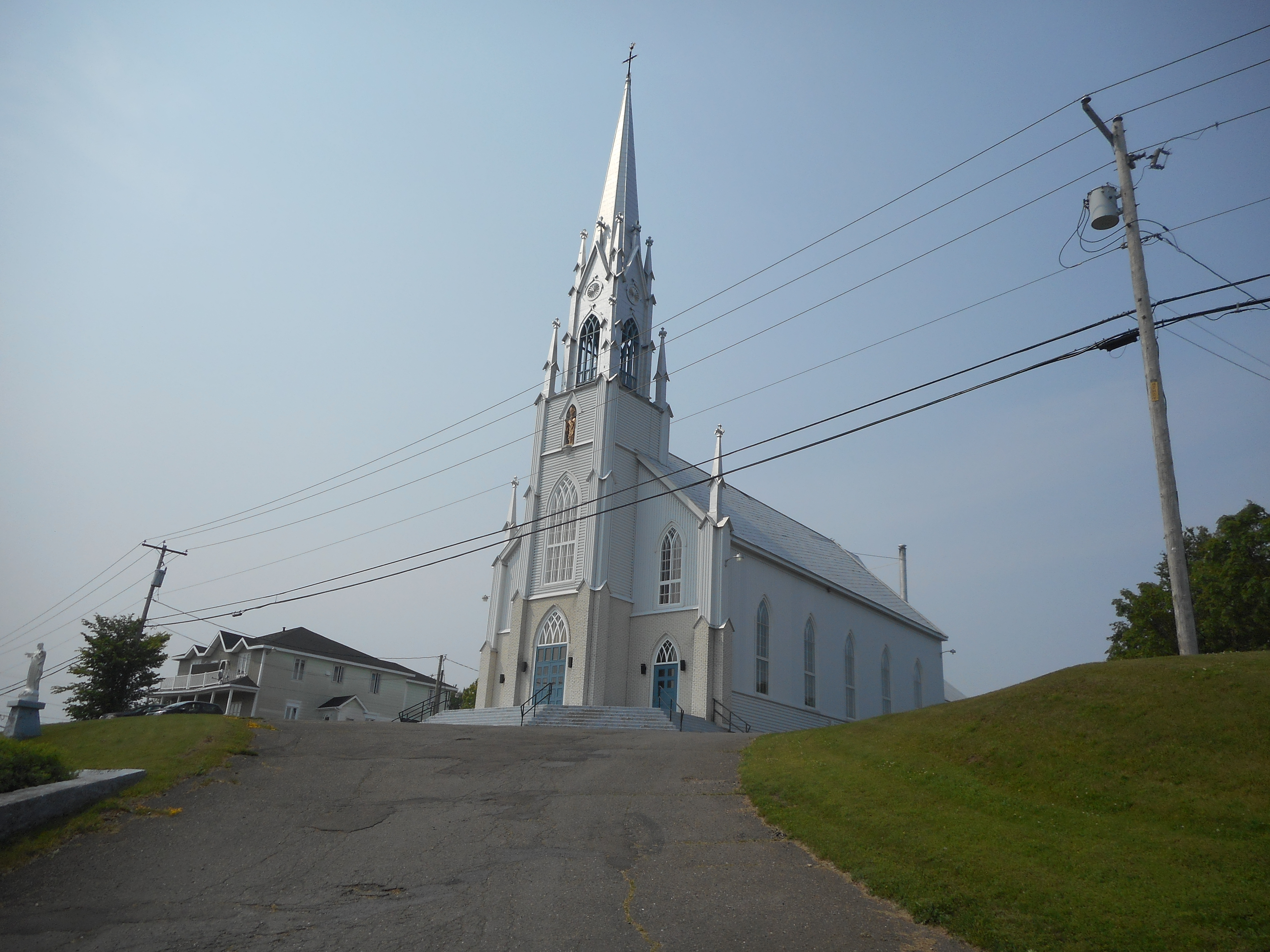 Église de Saint-Omer, route 132 Est, Carleton-sur-Mer, Québec